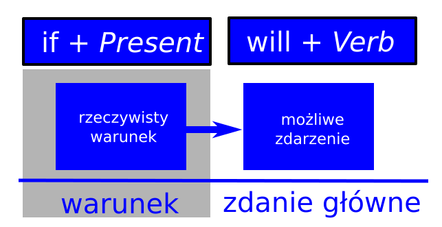 I tryb warunkowy